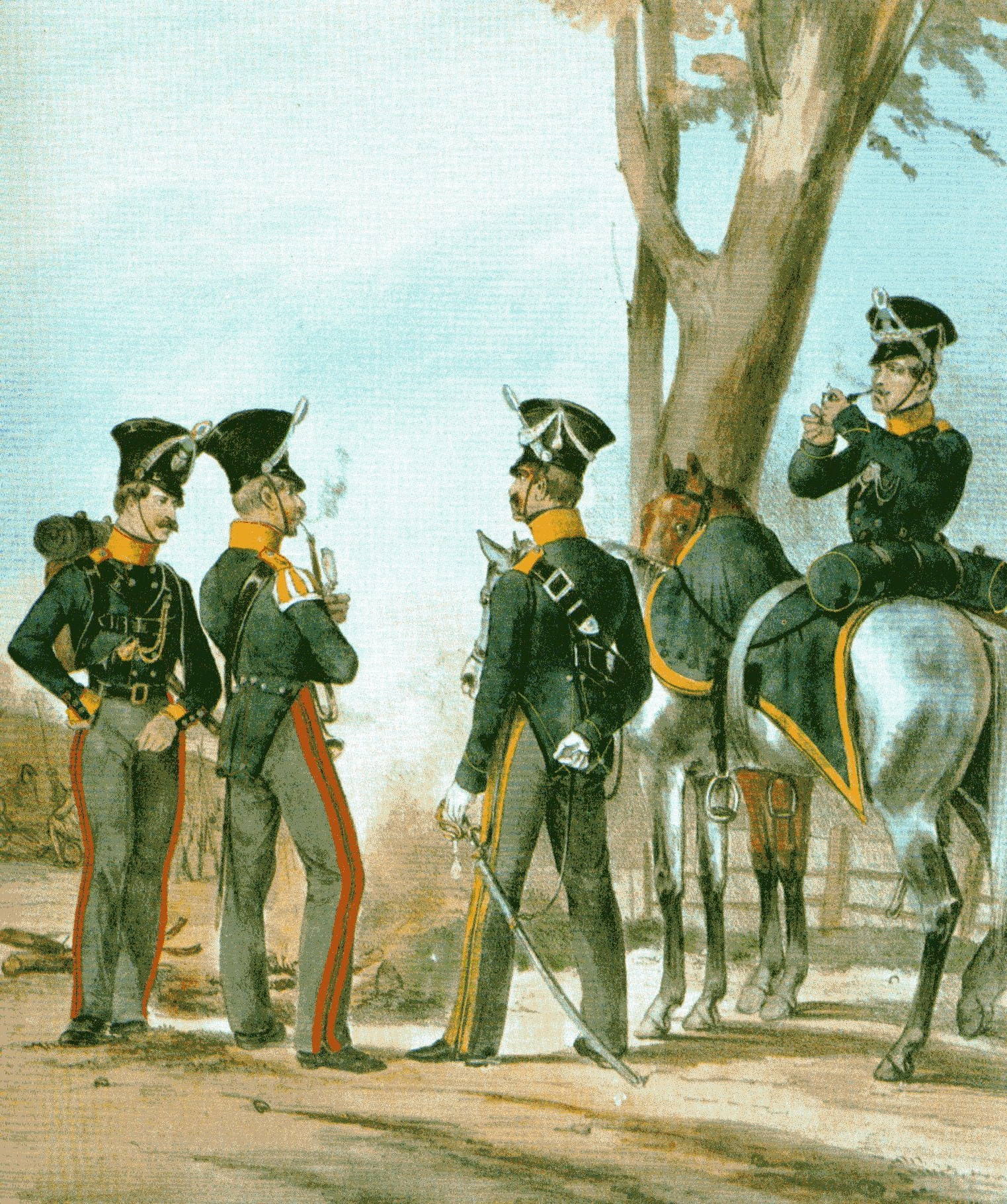 Scharfschützen und Gendarmen des Fürstentums Anhalt-Köthen um 1840. Auf der linken Bildseite mit roten Biesen zwei Scharfschützen, auf der rechten Bildseite mit gelben Biesen zwei Gendarmen